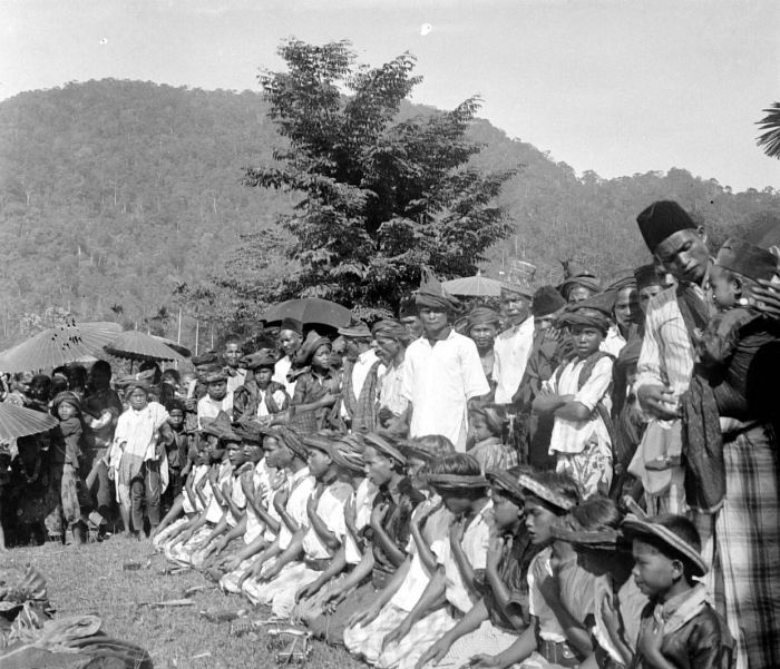 Negatief. Het zogenaamde Main Thaman te Lokep